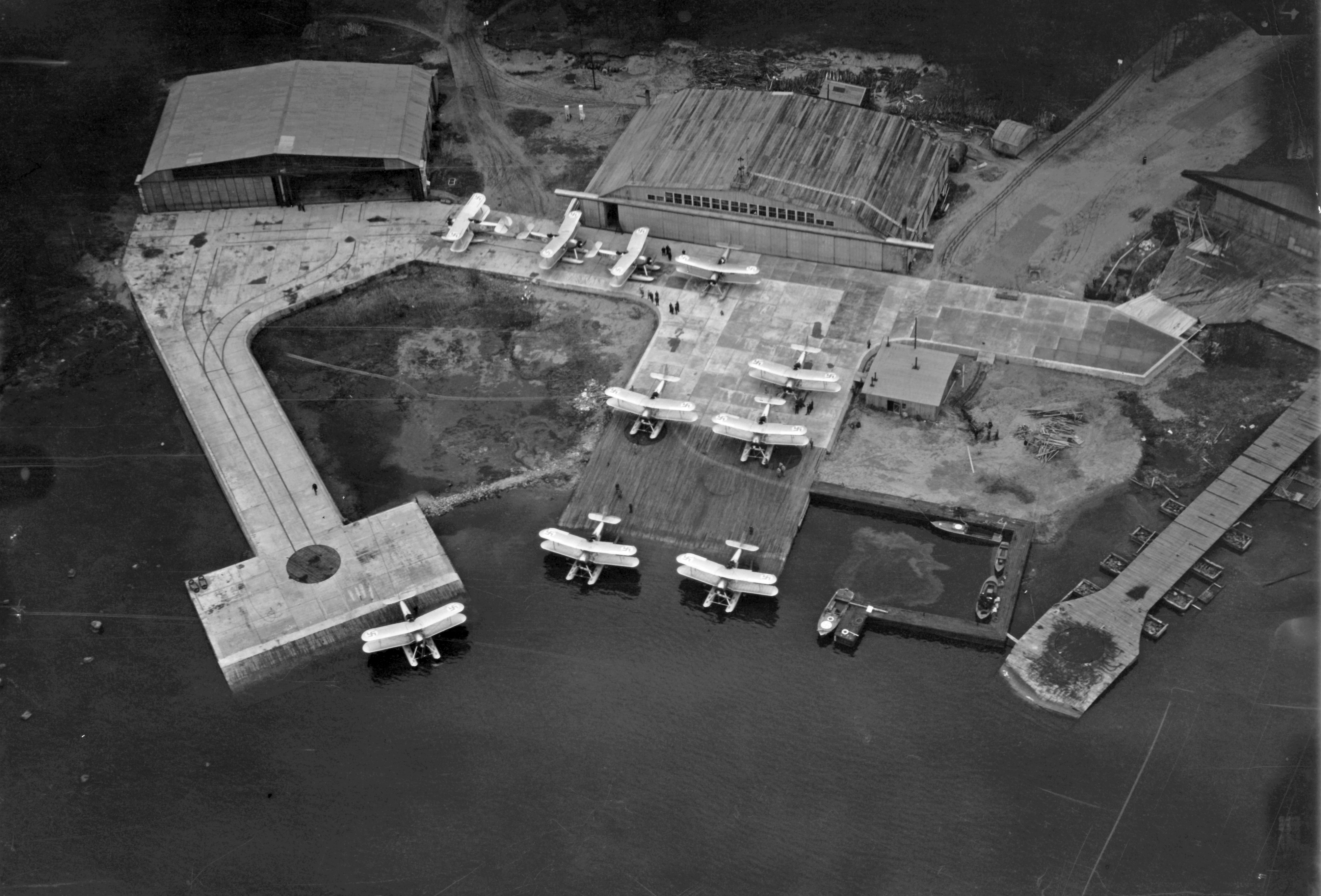 Santahaminan vesilentoasema ja Ripon -meritoimintakoneet 16. toukokuuta 1933.